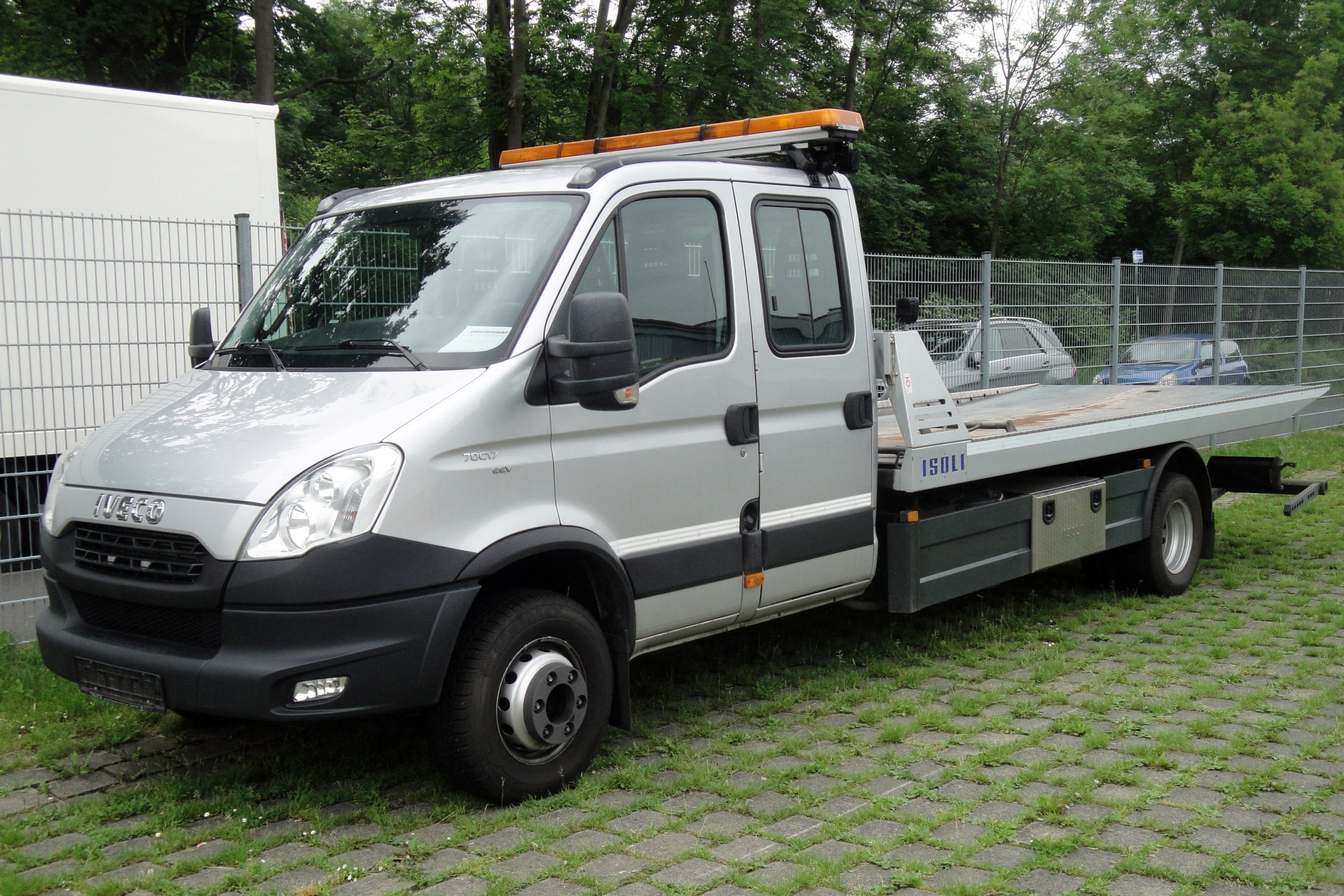 Abschleppwagen Iveco Daily 70C17, Isoli Schiebeplateau, Internationale Fachausstellung Bergen und Abschleppen 2016, Kassel